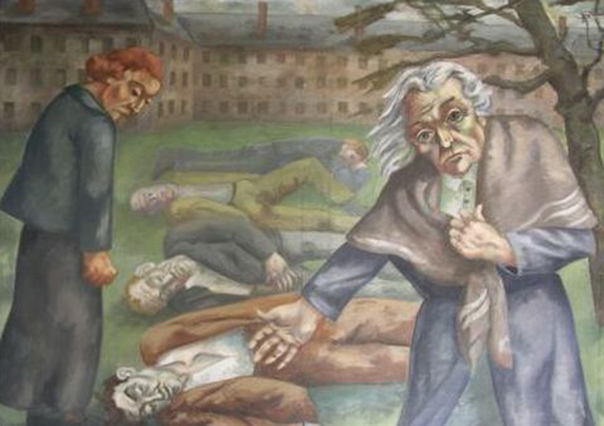 Peter Ludwigs (1888-1943) "Mutter B.", um 1937, Öl auf Leinwand Der Maler verarbeitete in diesem Bild Nachrichten über Verfolgung, Verhaftung und Ermordung von Freunden aus dem Widerstand.